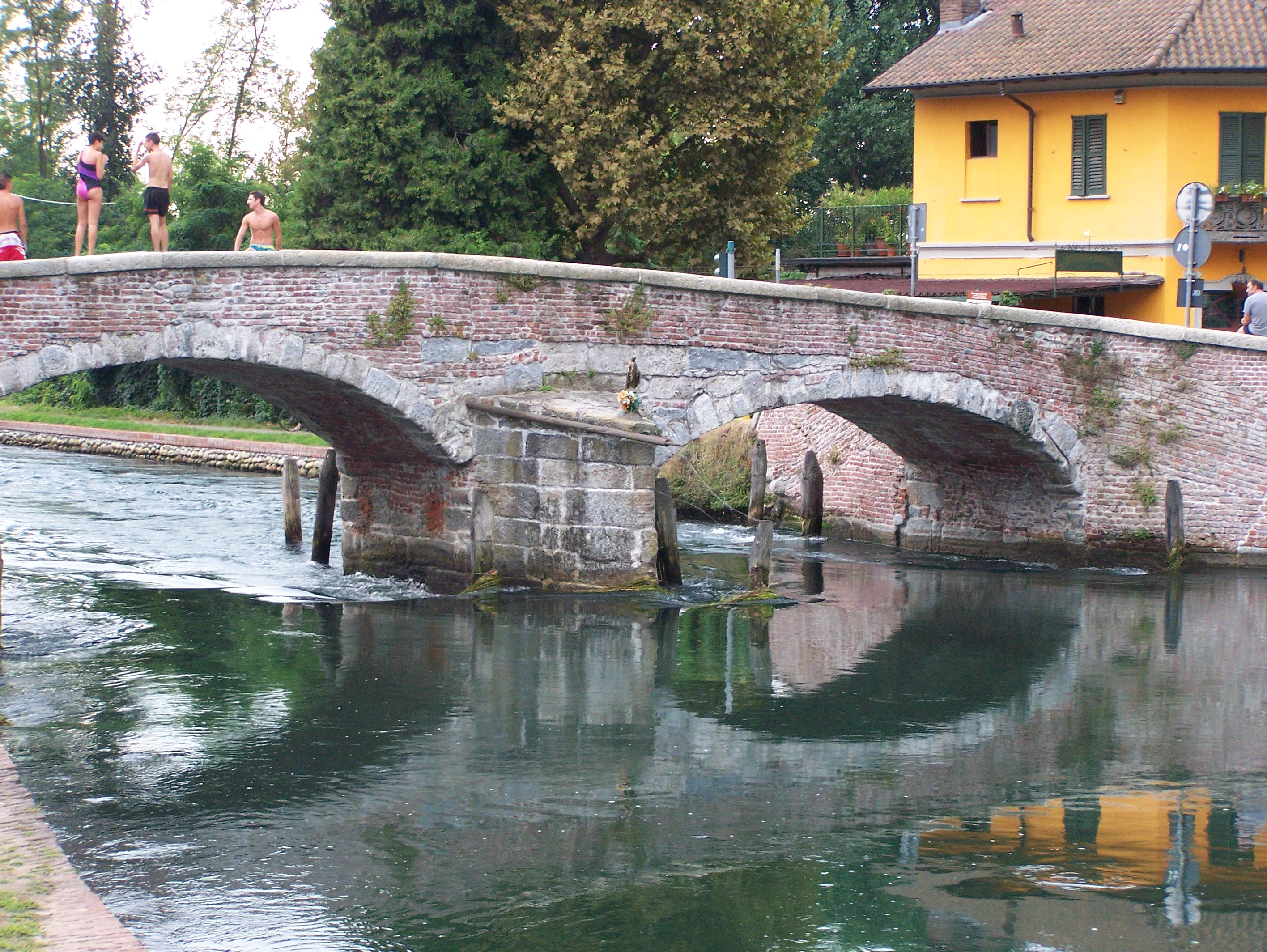 Vista del ponte di Castelletto di Cuggiono (MI) - Italy